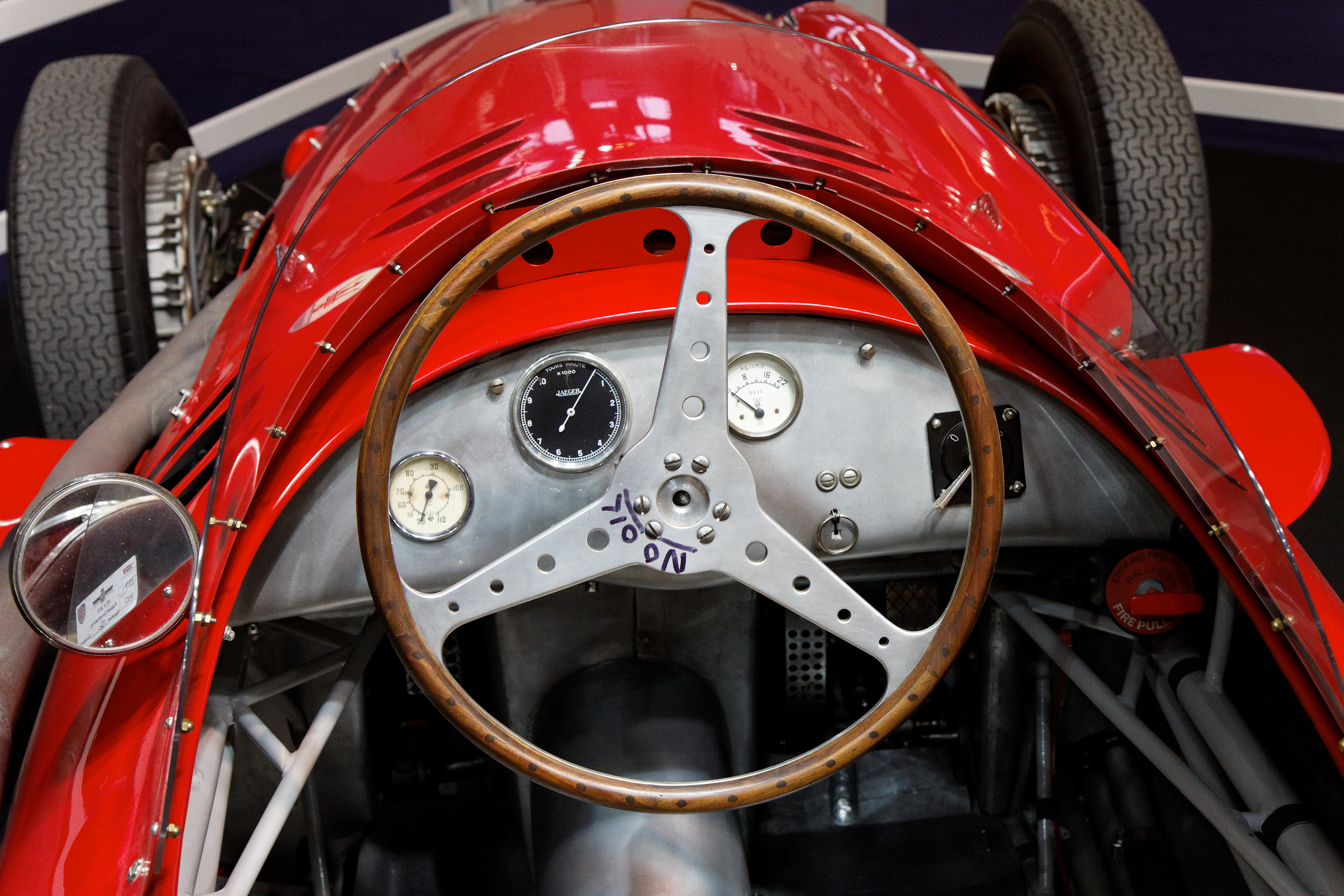 Photographie prise lors du salon rétromobile 2011 à Paris, porte de Versailles.